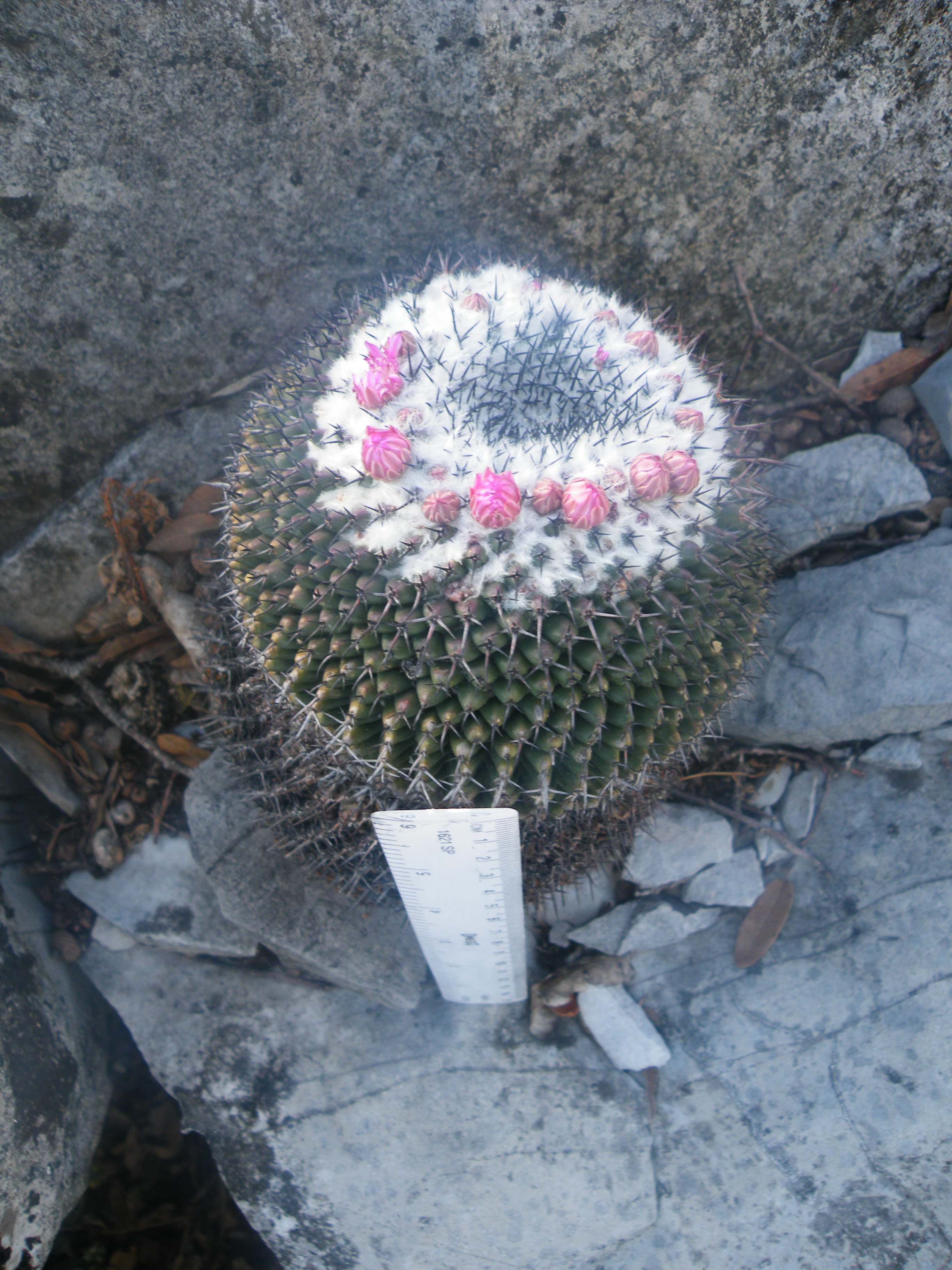 Valle De Los Fantasmas, SLP